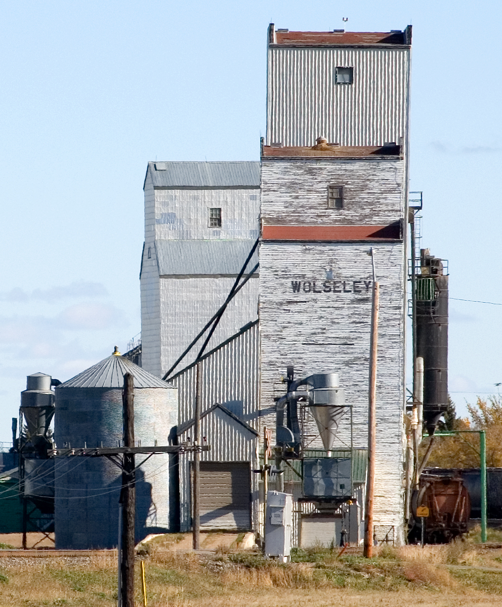 Grain elevators, Wolseley